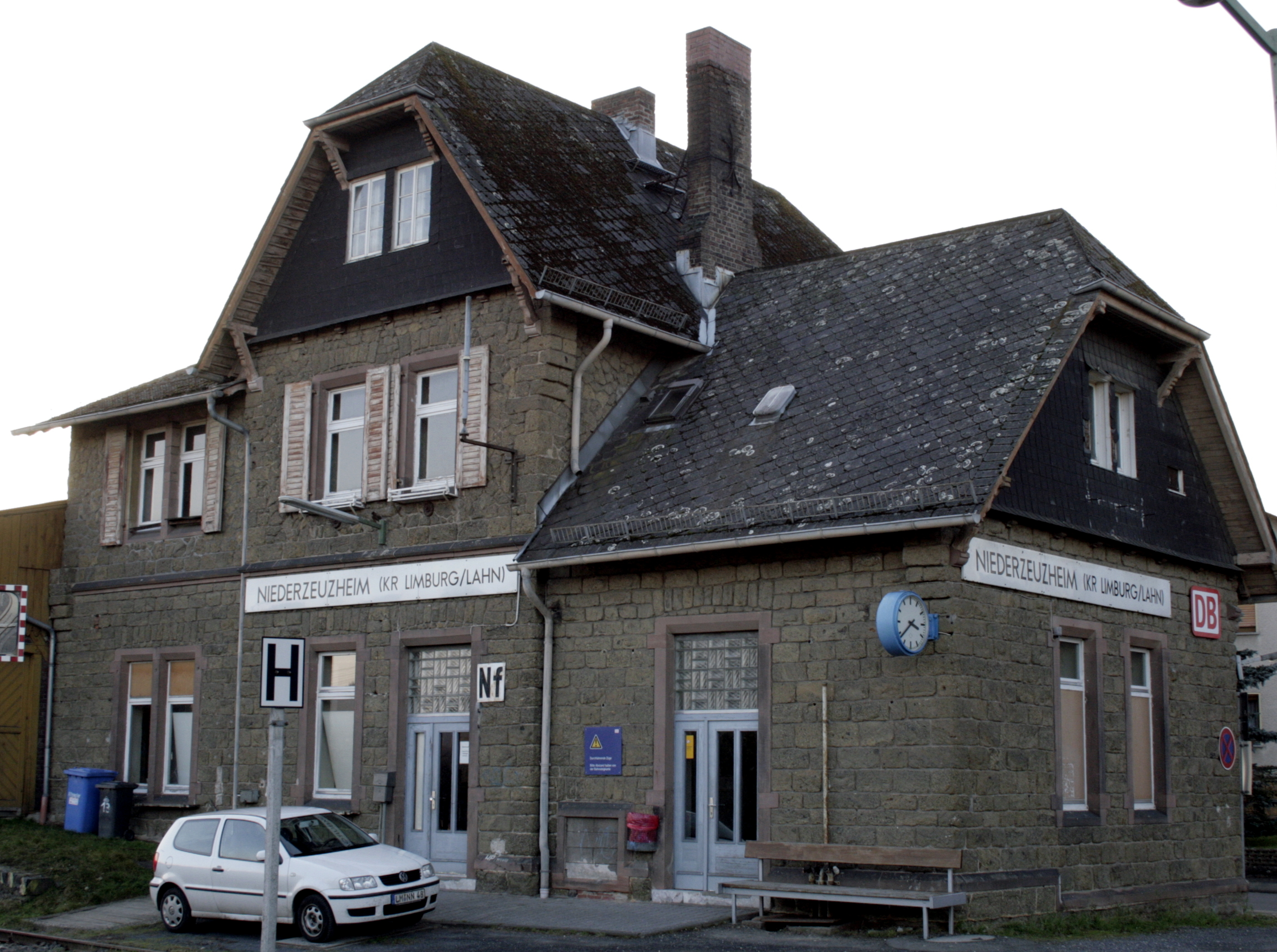 Bahnhof in Hadamar-Niederzeuzheim, Deutschland